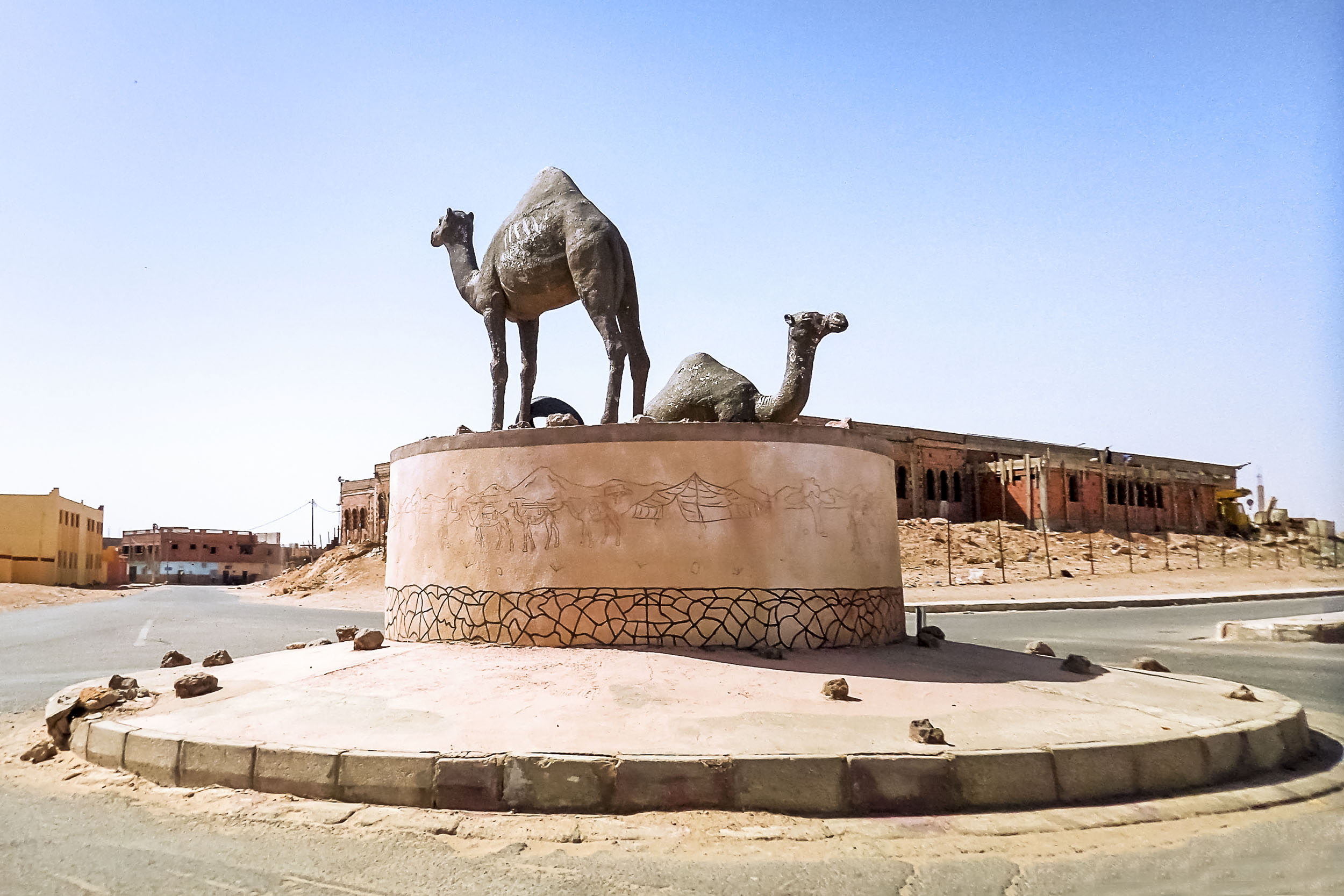 Ville de Tindouf مدينة تندوف